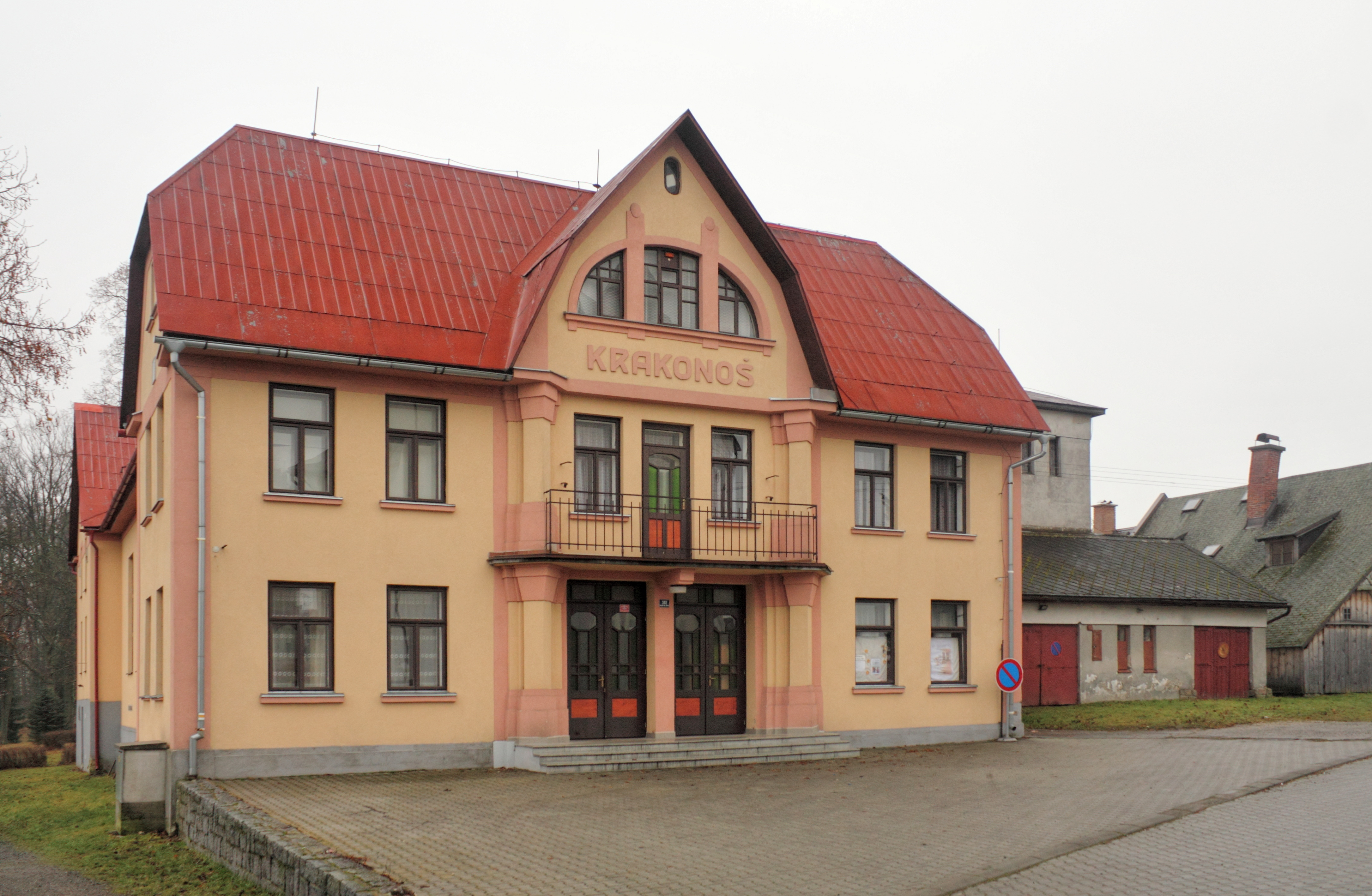 Divadelní spolek "Krakonoš", Vysoké nad Jizerou 302